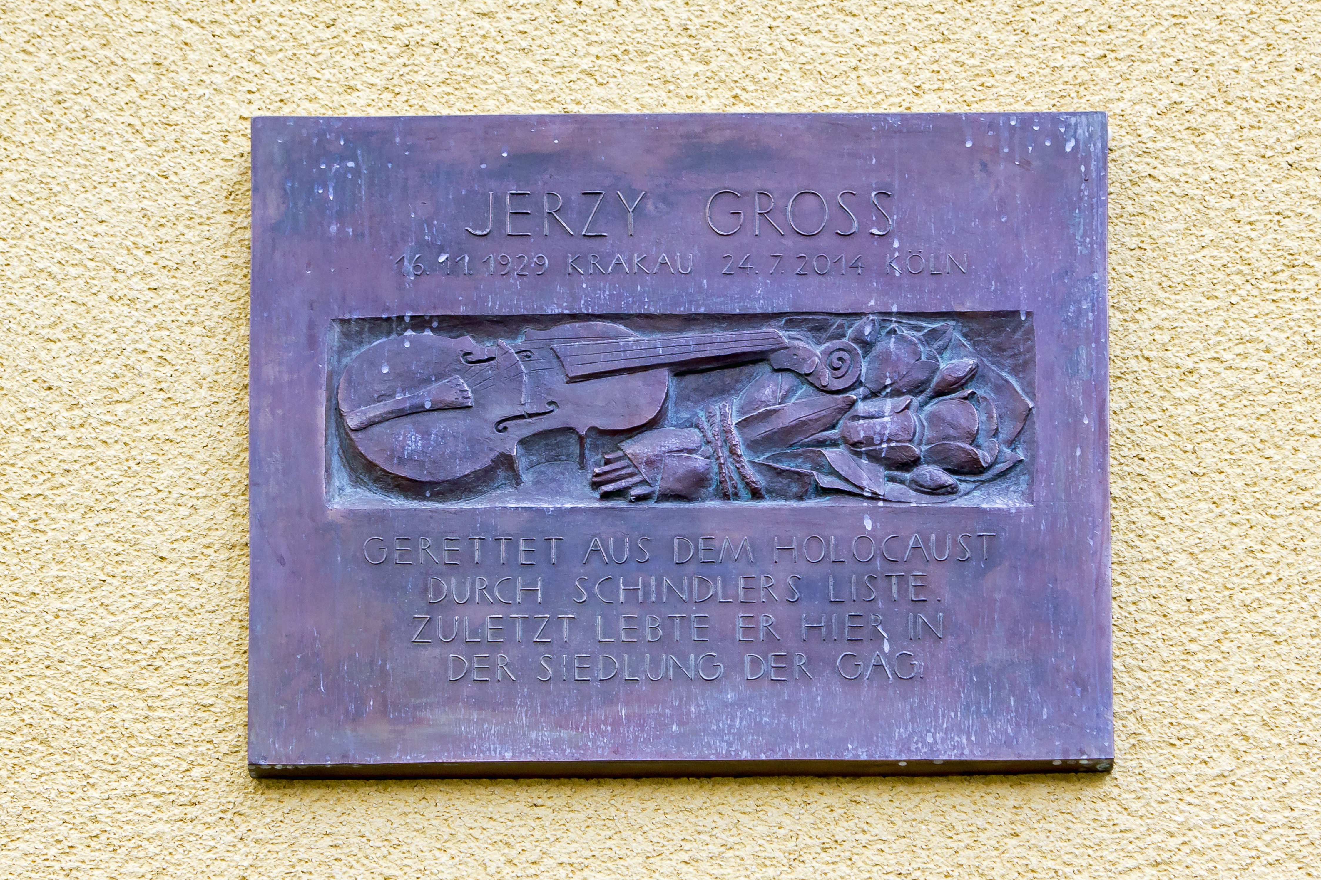 Gedenktafel für Jerzy Gross in Köln-Bickendorf an einem Wohnhaus der GAG auf der Westendstraße